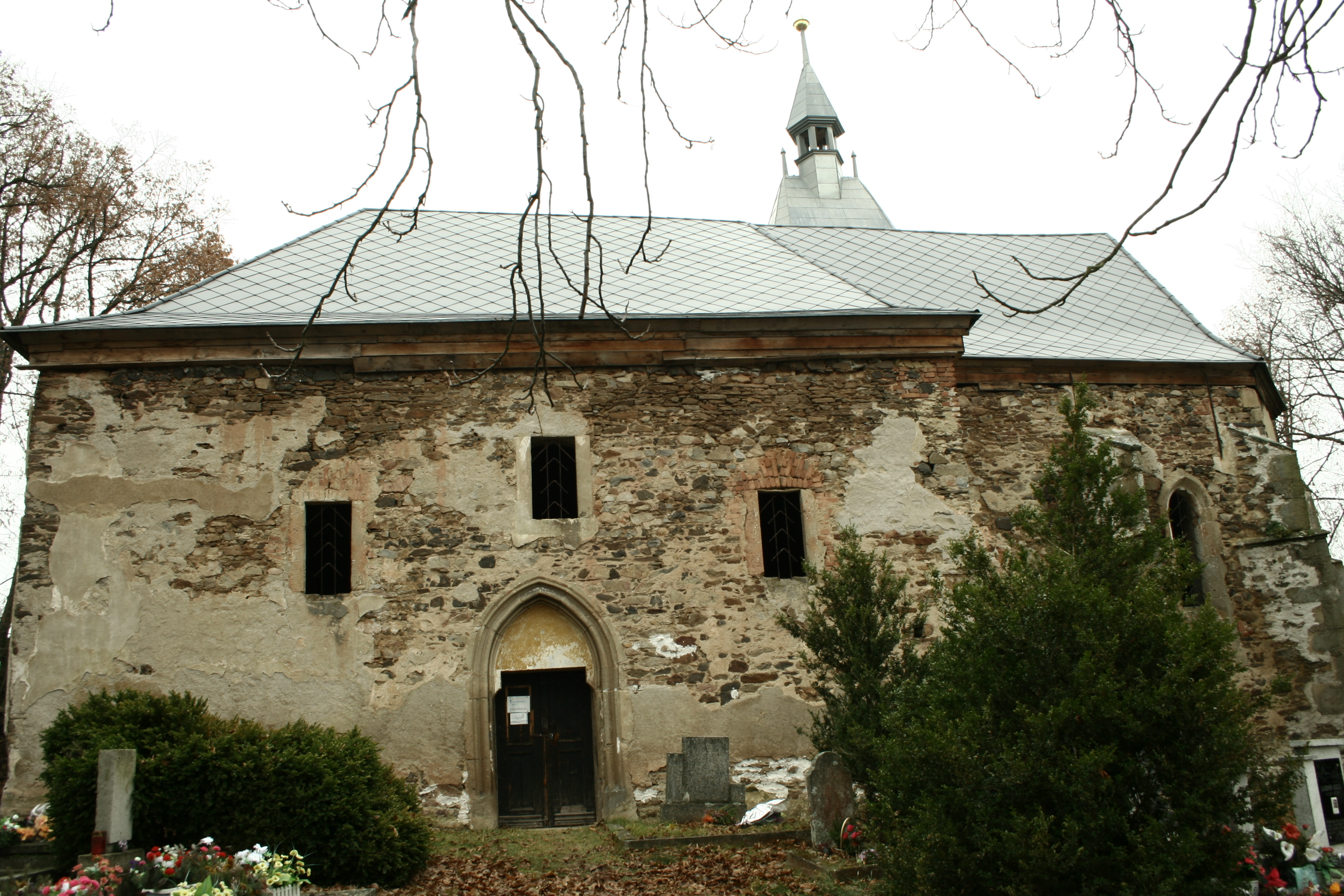 Kostel Všech svatých (Čichalov) vnější pohled, stav k roku 2012